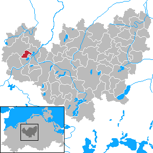 Steinhagen in Mecklenburg-Vorpommern - District Güstrow